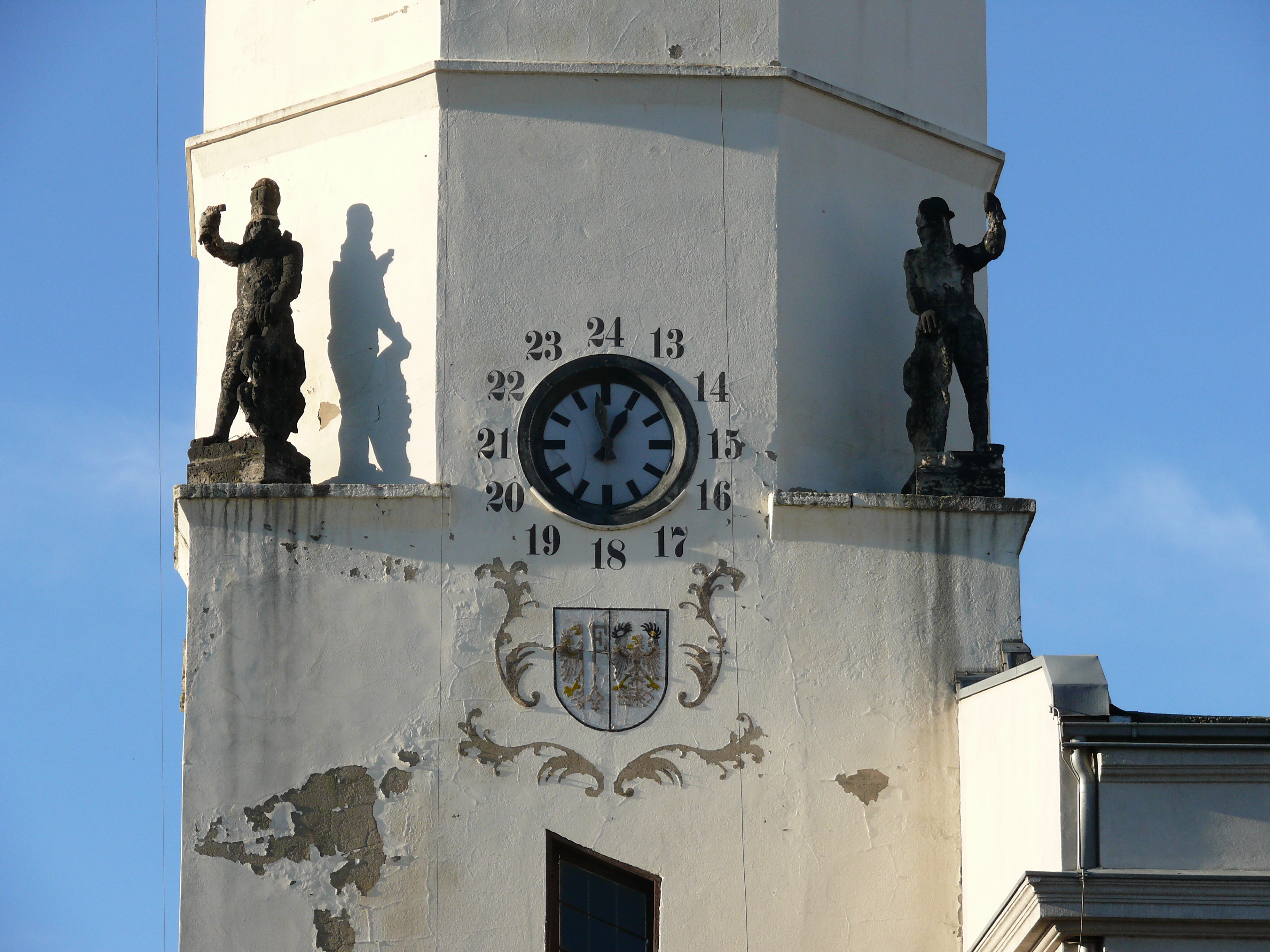 Wappen am Turm des ehemaligen Neustädter Rathauses der Hansestadt Salzwedel.